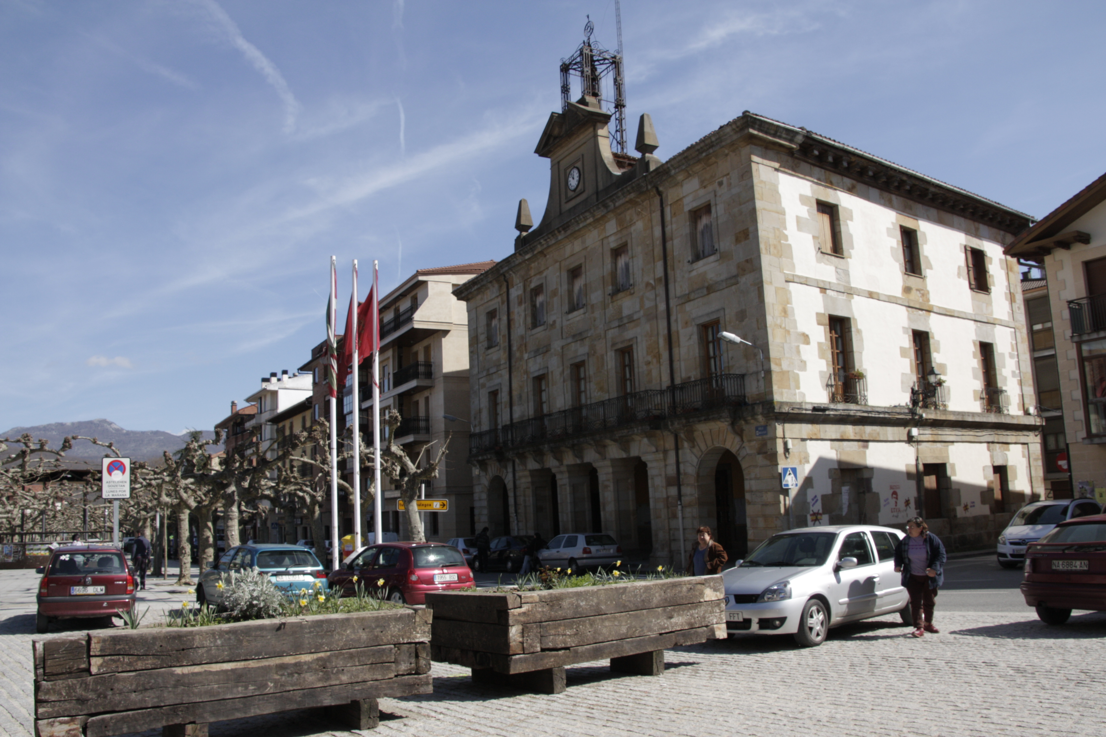 Estremeñu: Etxarri-Aranaz udalerriko udaletxea. Nafarroa, Euskal Herria. Town Hall of Etxarri-Aranatz village. Navarre, Basque Country.